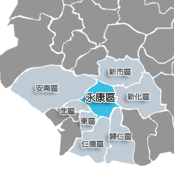 永康區相對位置